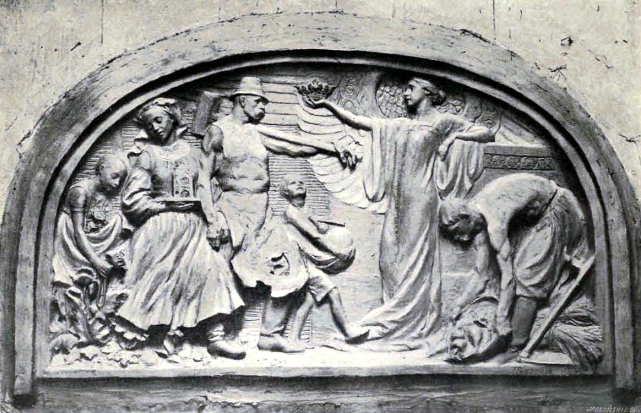 Рельєф на фасаді дому Технічного товариства у Кракові. Скульптор Ян Рашка.